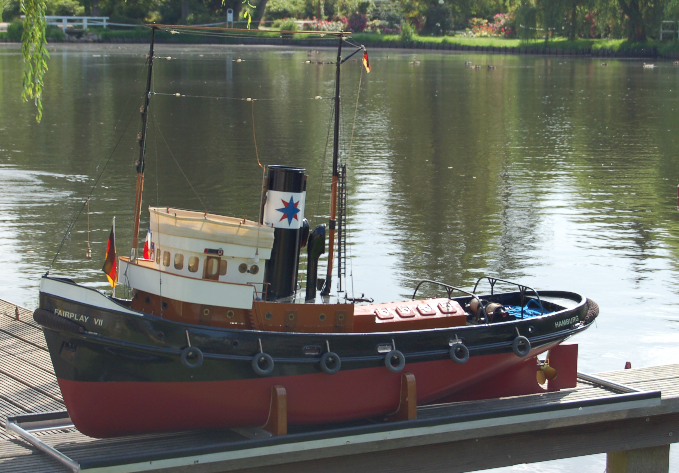 Modell des Schleppers "Fairplay VII" beim Schaufahren im Rosarium Uetersen anlässlich der 775-Jahr-Feier der Stadt.